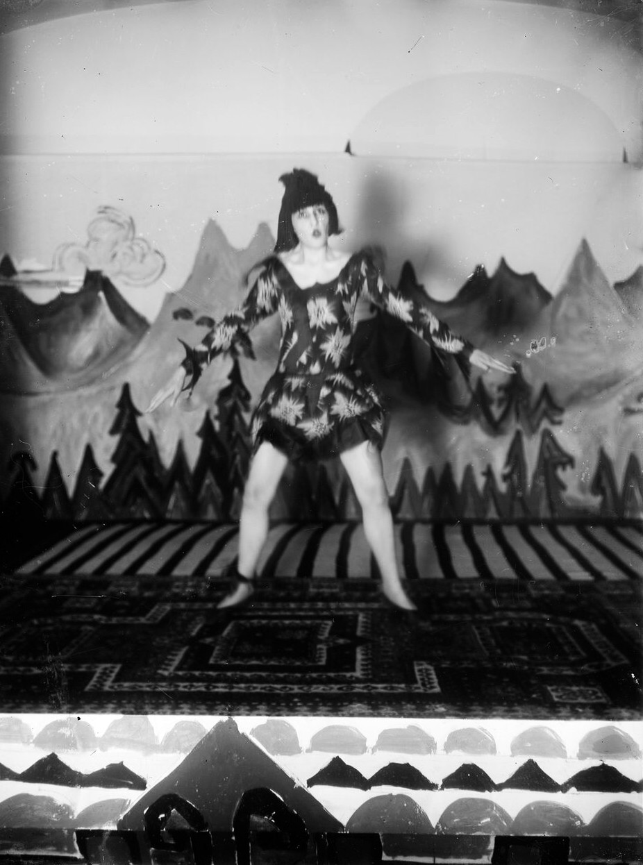 Nina Hard tanzt iin der Zürcher Heilstätte Clavadel, Bühnengestaltung Ernst Ludwig Kirchner, Foto von Ernst Ludwig Kirchner 1921